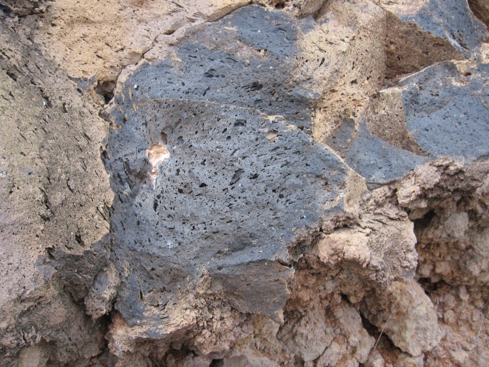 basalt from Cala Fuili Dorgali